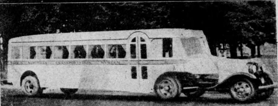 ドイツ製の豪華なバス